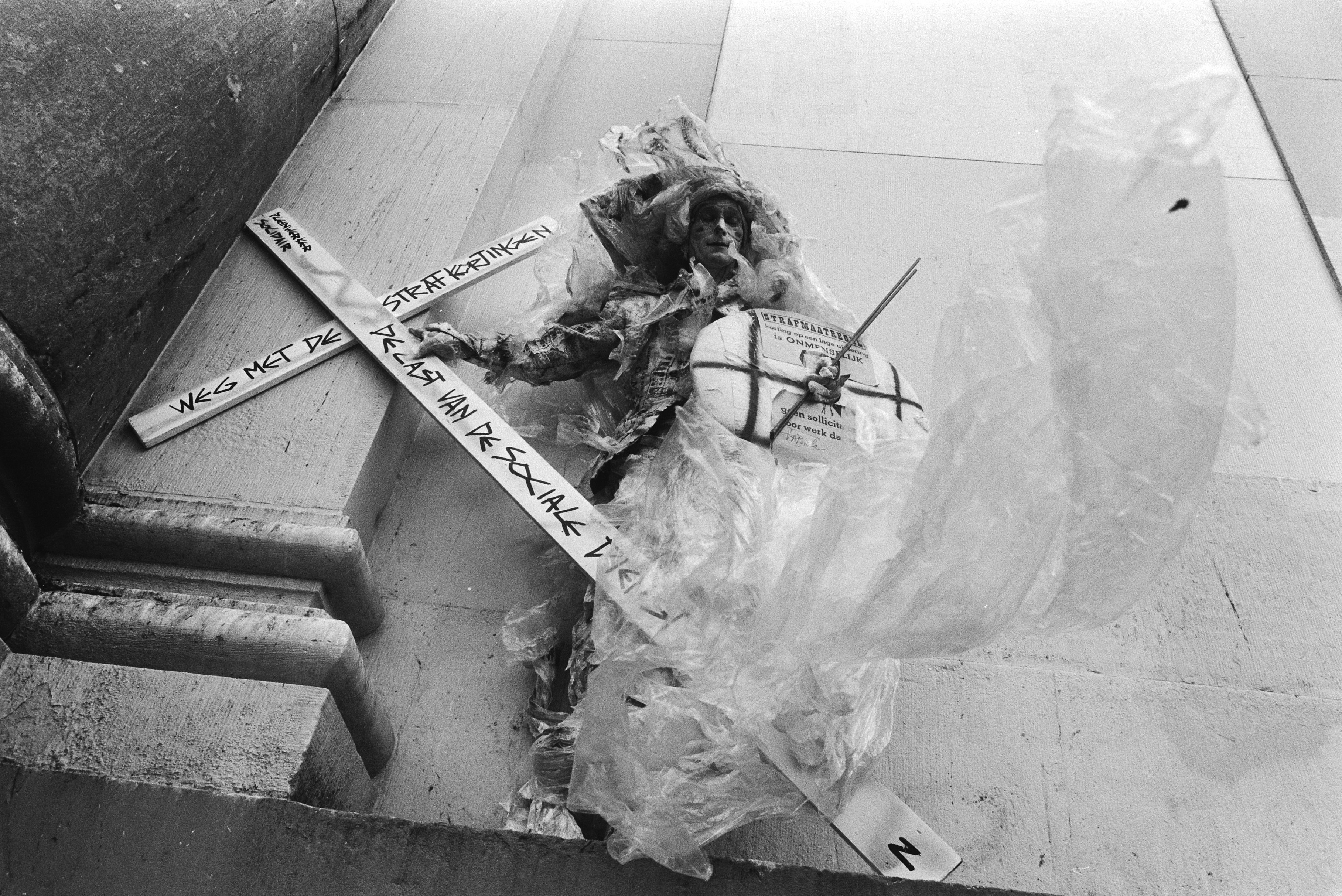 Collectie / Archief : Fotocollectie Anefo Reportage / Serie : Vertrek van "Levend Kunstwerk" Fabiola van het Waterlooplein in Amsterdam voor een voettocht naar Den Haag om te protesteren tegen de korting op sociale uitkeringen en de sollicitatieplicht voor werk dat er niet is Beschrijving : Fabiola met kruis Datum : 7 april 1983 Locatie : Amsterdam, Noord-Holland Trefwoorden : acties, bezuinigingen, sociale voorzieningen, straatartiesten Persoonsnaam : Fabiola Fotograaf : Bogaerts, Rob / Anefo Auteursrechthebbende : Nationaal Archief Materiaalsoort : Negatief (zwart/wit) Nummer archiefinventaris : bekijk toegang 2.24.01.05 Bestanddeelnummer : 932-5548